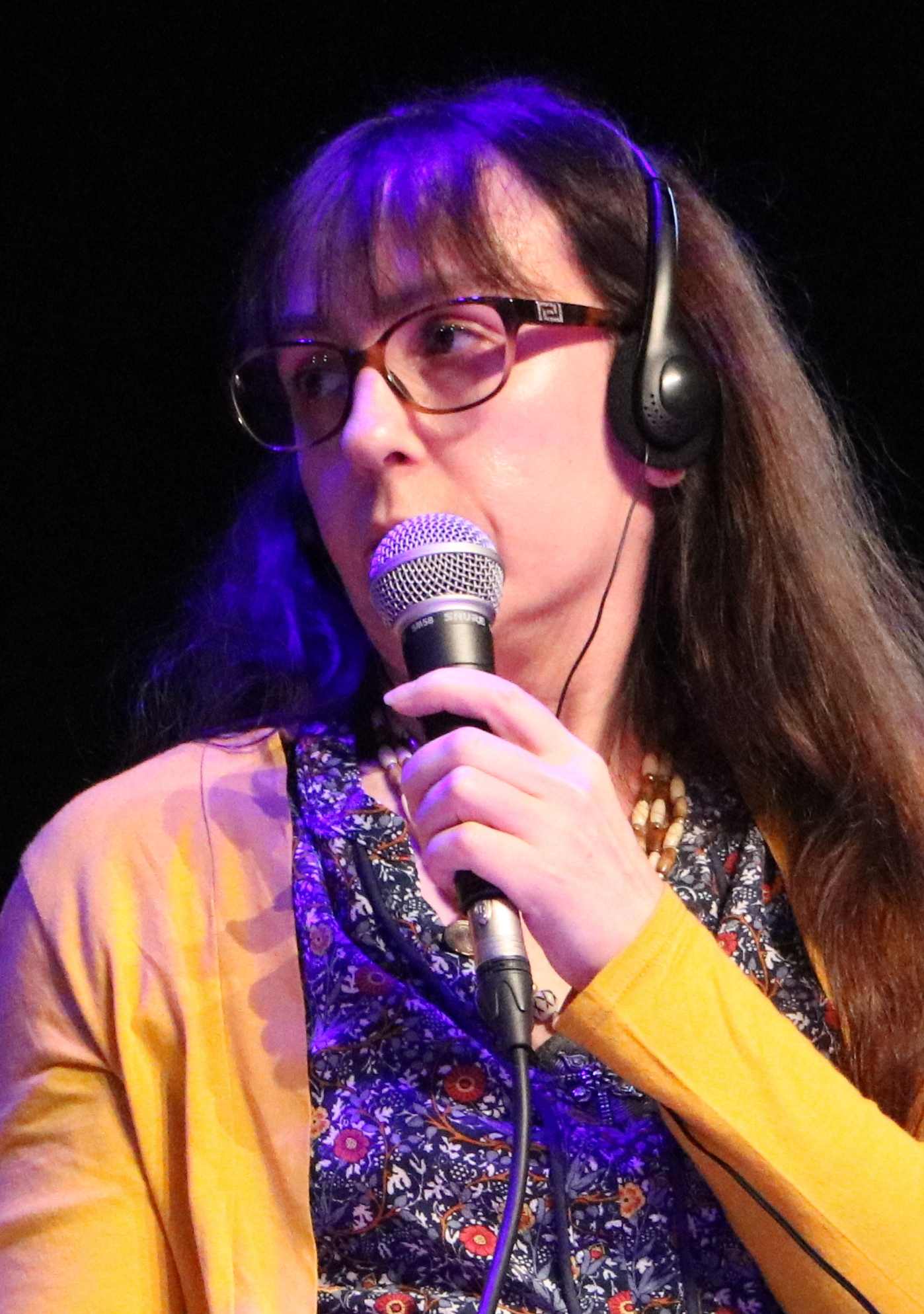 Valérie Mangin lors des Utopiales 2017.